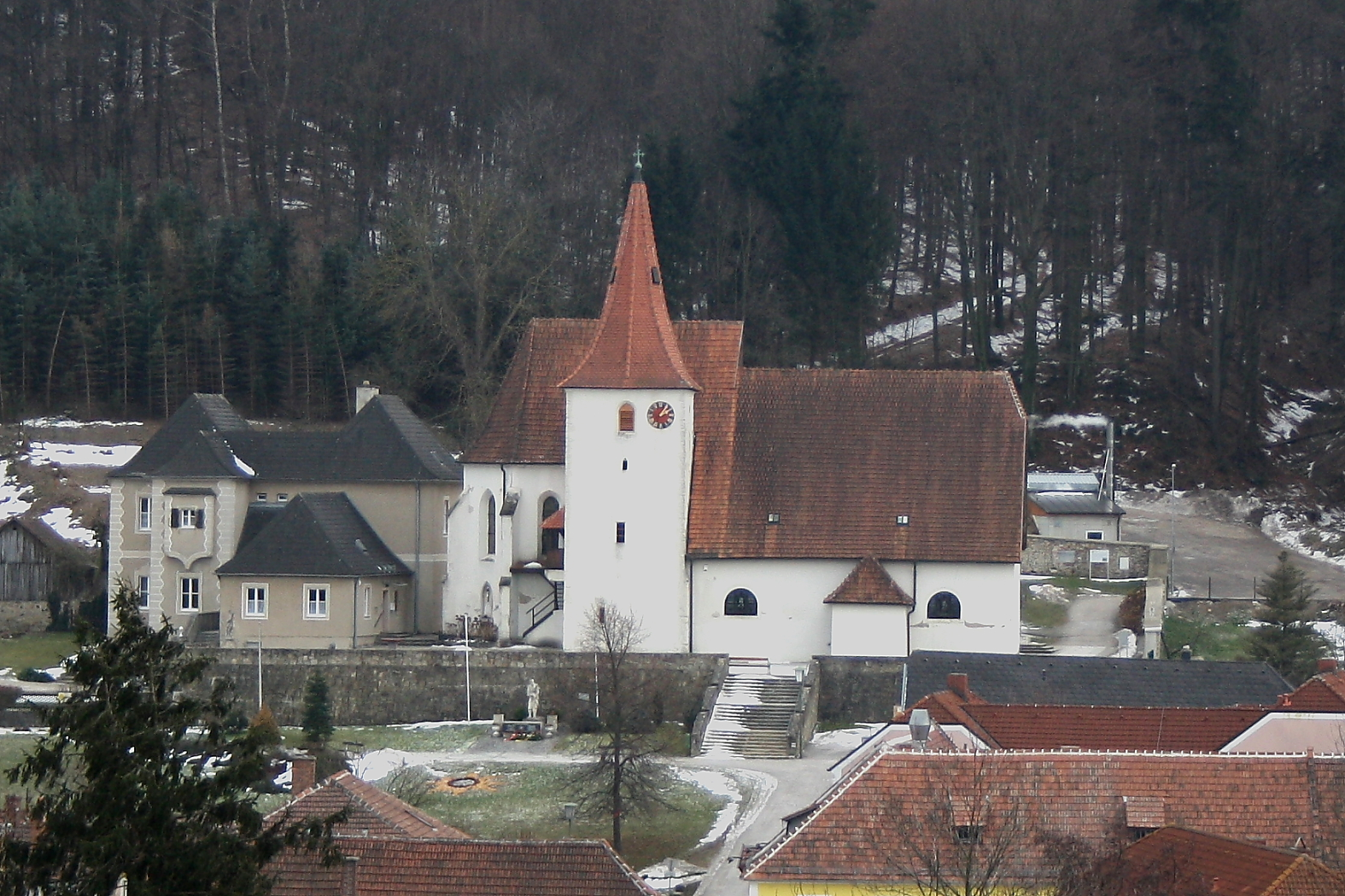 Die Nordansicht der röm.-kath. Pfarrkirche von Altlengbach